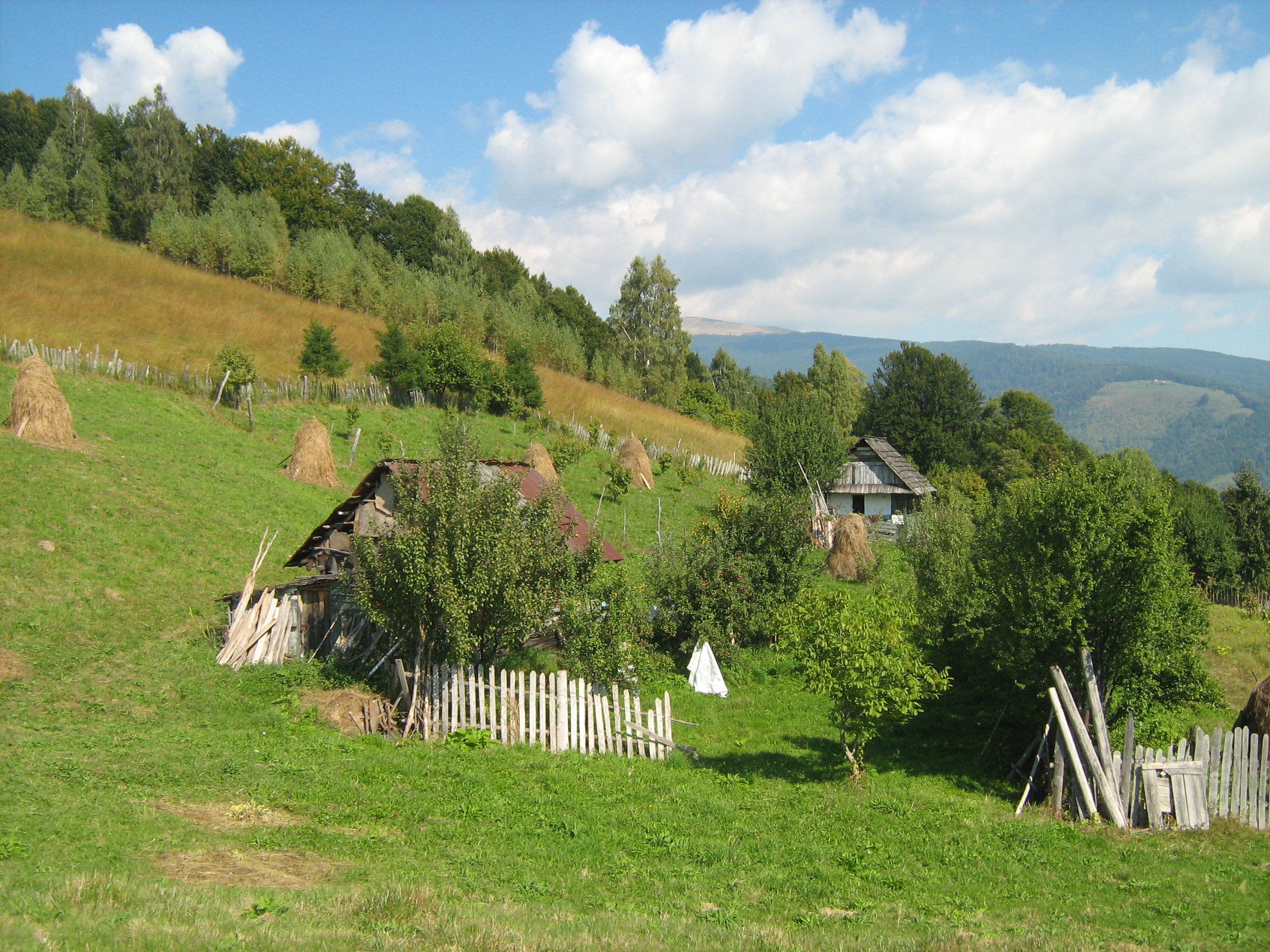 Casute pe culmea Runculet